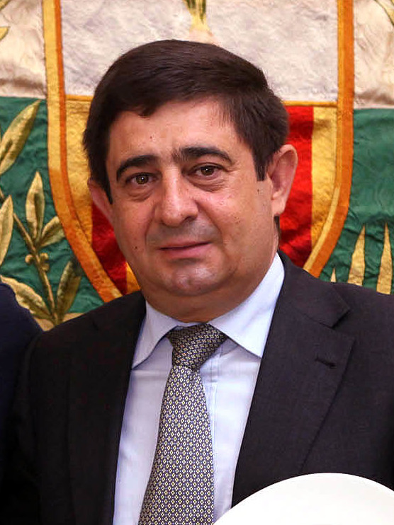 L’alcalde de Sabadell, Joan Carles Sánchez, ha rebut, aquest matí, a la delegació de la Diputació de Jaén, encapçalada pel seu president Francisco Reyes, amb motiu de la carpa que instal·len aquest cap de setmana al Parc de Catalunya per promocionar Jaén. Posteriorment, s'ha inaugurat una carpa a la plaça de l’Argub de la ciutat per promocionar els productes i la zona de Jaén. La carpa està distribuïda en tres espais: un monogràfic dedicat a la promoció de la Ruta dels Castells i les Batalles, un altre dedicat a la degustació i difusió dels olis d'oliva verge extra "Jaén Selecció 2014", i un tercer espai dedicat a la promoció turística de la resta de destinacions que ofereix la província de Jaén.